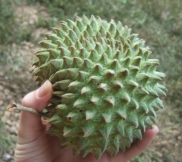 Soncoya, fruto de la familia de las anonas. Está verde en la foto (no maduro).